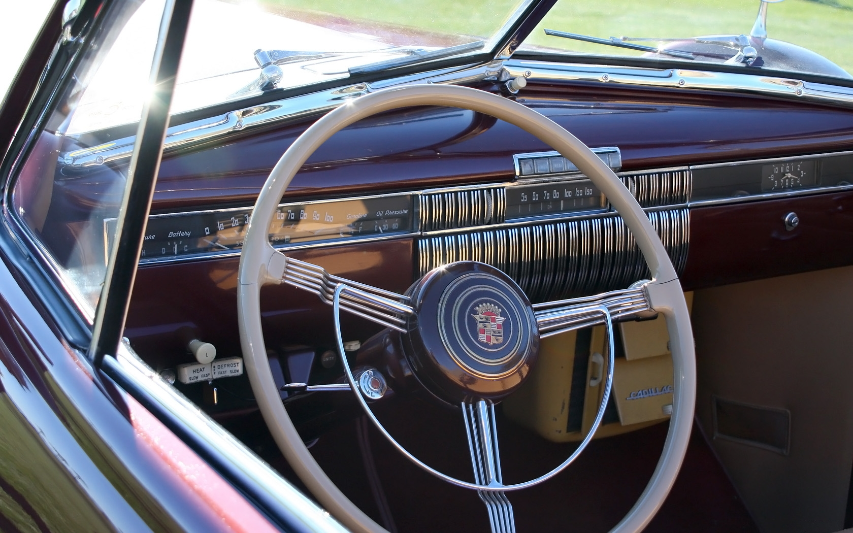 2011 Desert Classic, La Quinta, CA